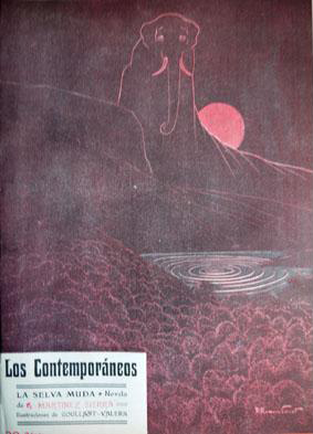 Portada de La selva muda.